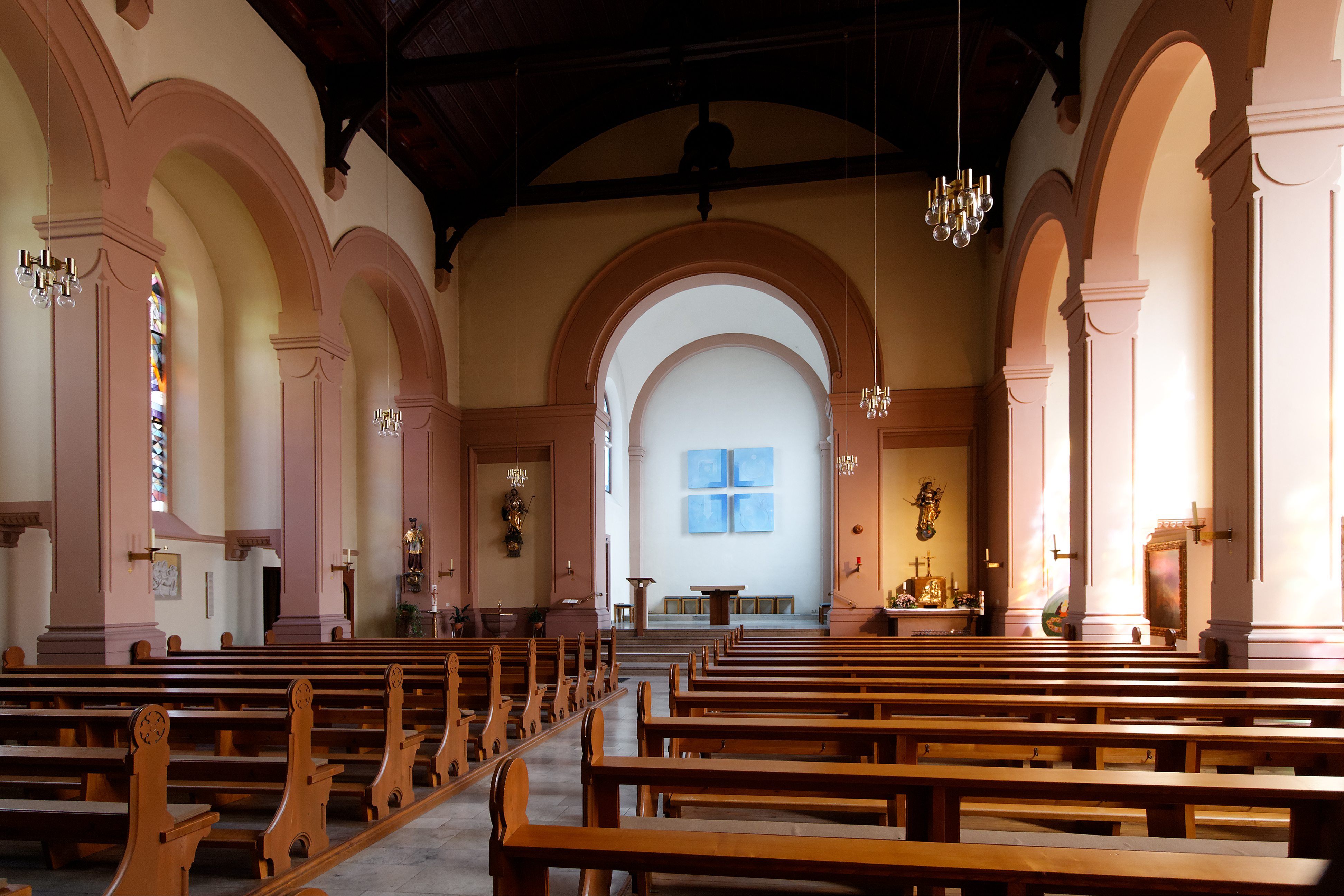 Katholische Kirche St. Johannes Nepomuk in Neckargemünd (Baden).